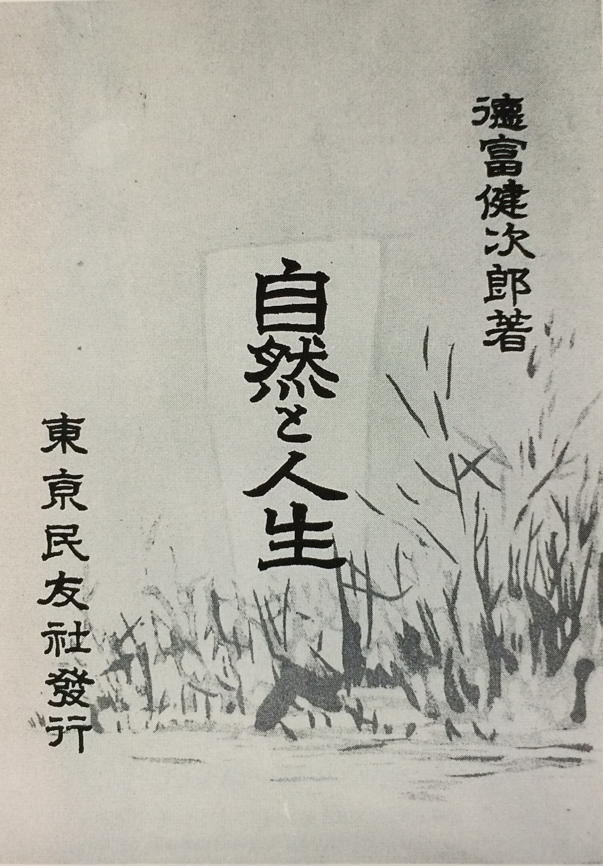 徳富蘆花（健次郎）「自然と人生」表紙（1900年発行）